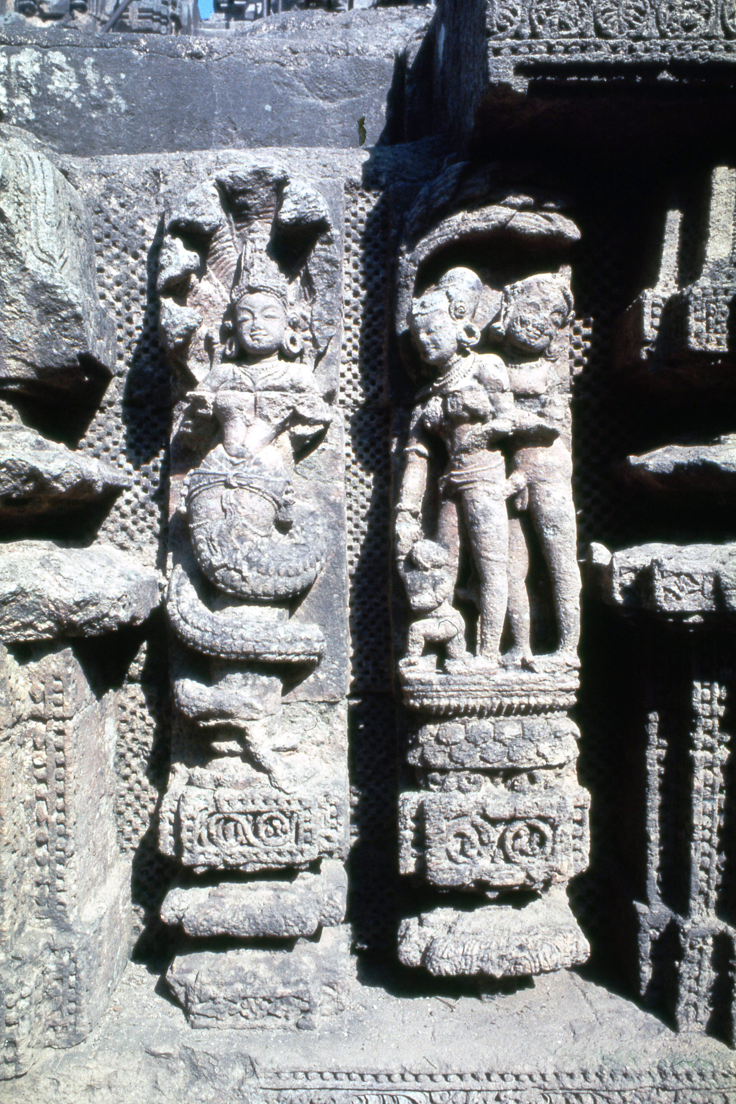 Orissa, Konark,Siglo XIII,Templo de Surya/Templo del sol, esculturas de una Nagini con capucha de cobras(izquierda) y de una Maithuna (derecha) en la fachada del templo